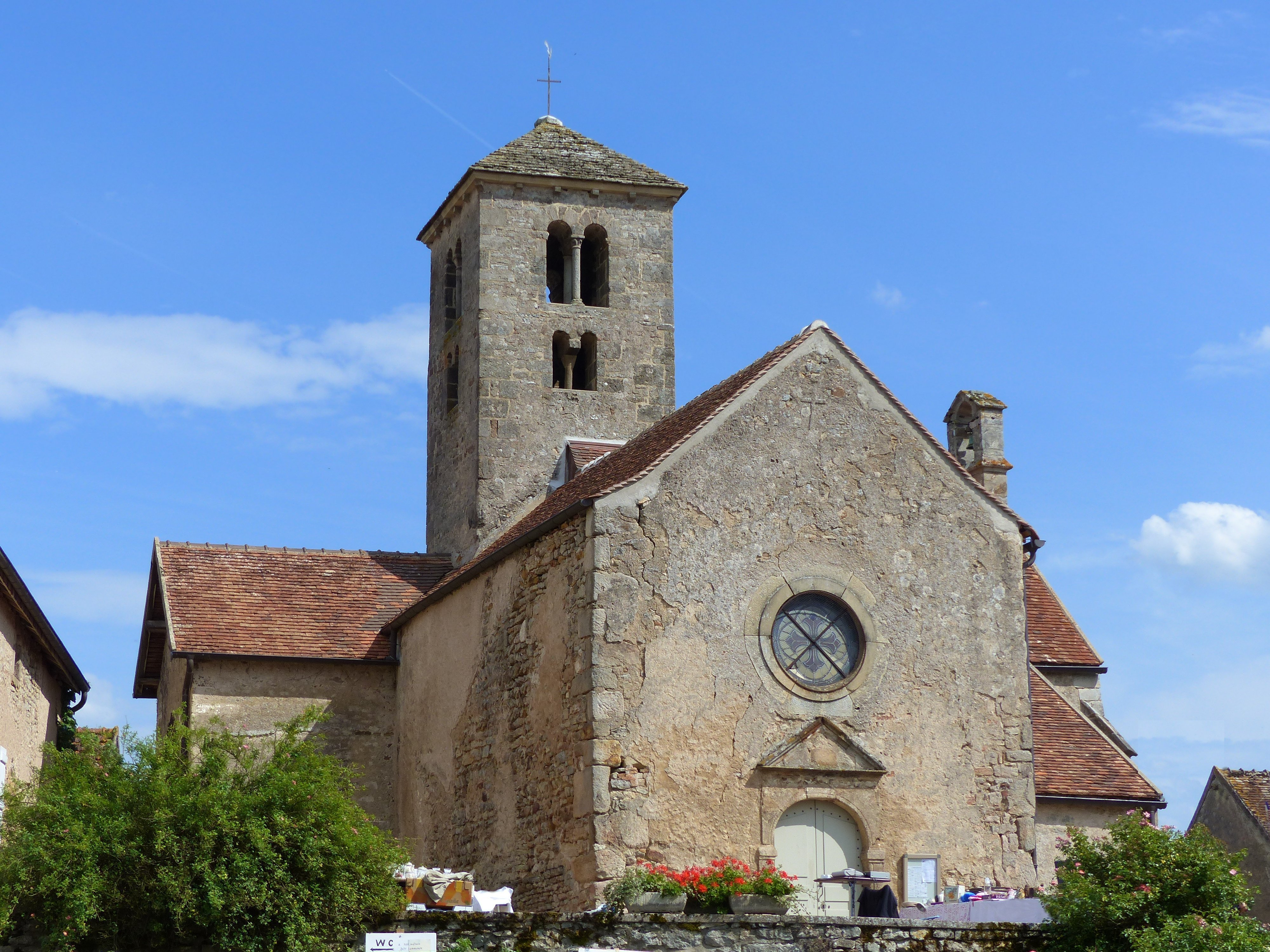 Eglise de Saint-Hurugure (71), en été, un jour de puces.